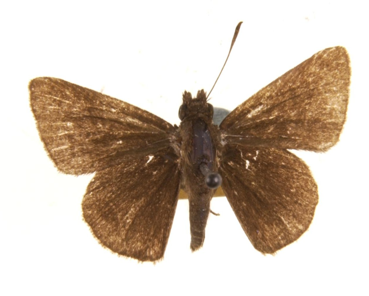 jhora